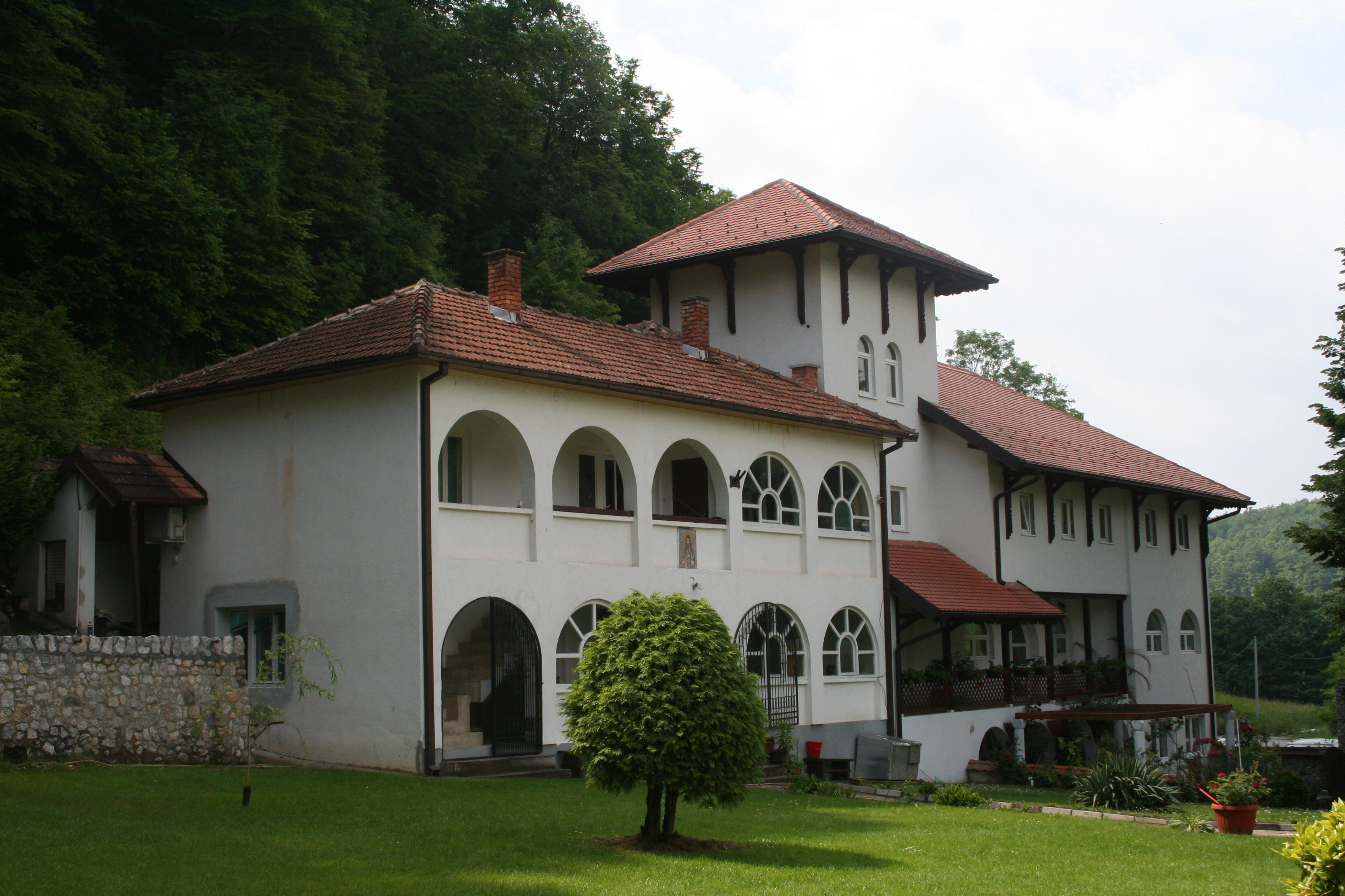 Manastir Jovanja